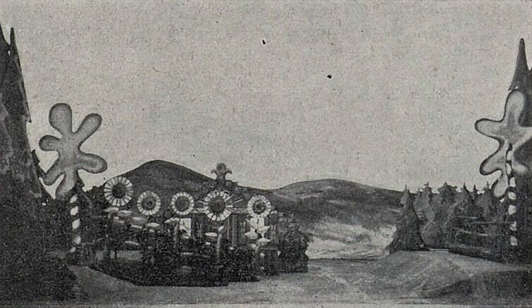 Přihody lišky Bystroušky, scéna Josefa Čapka, Národní divadlo Praha 1925